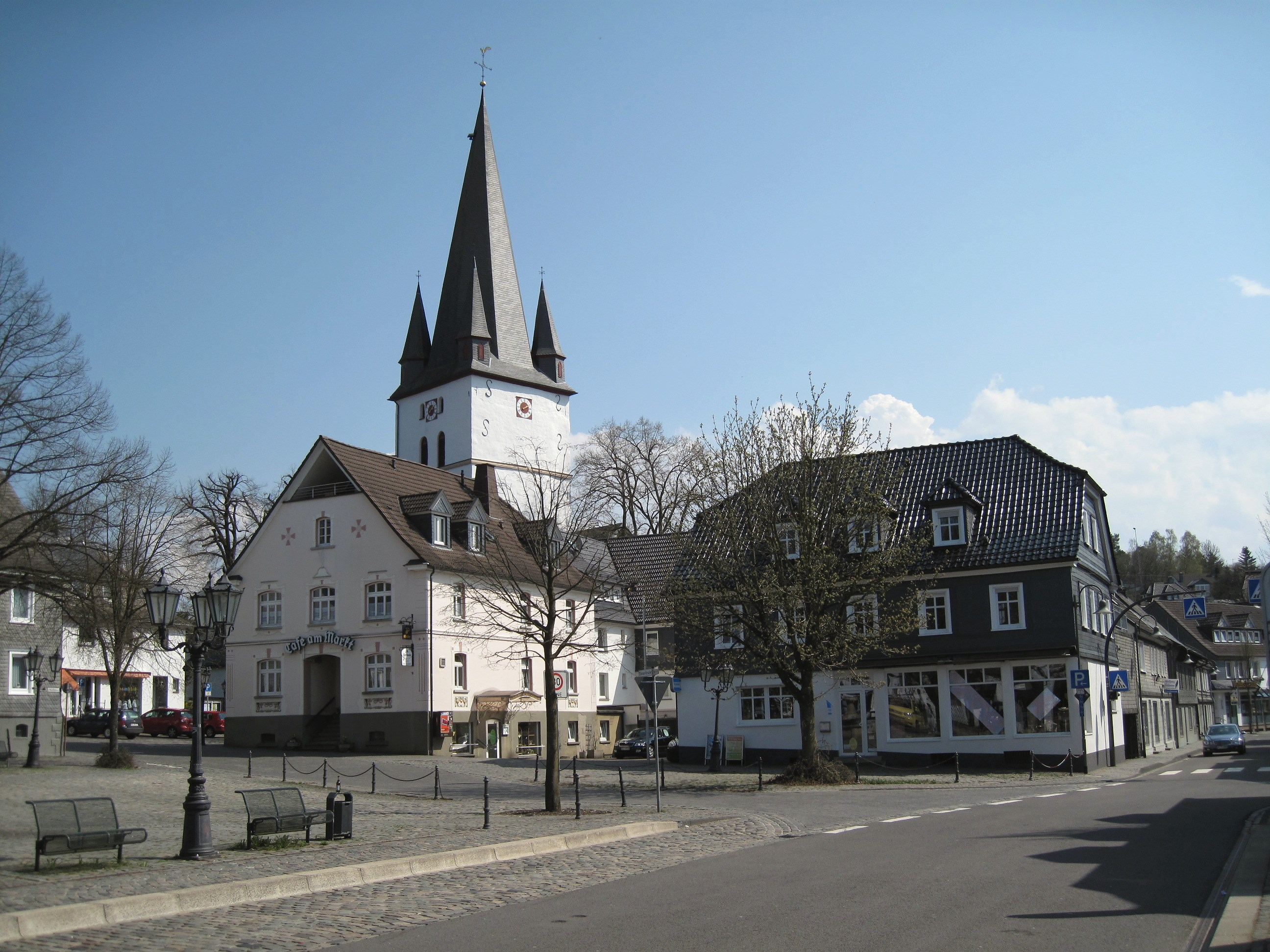 Marktplatz in Drolshagen mit „Cafe am Markt“ und im Hintergrund Pfarrkirche St. Clemens.